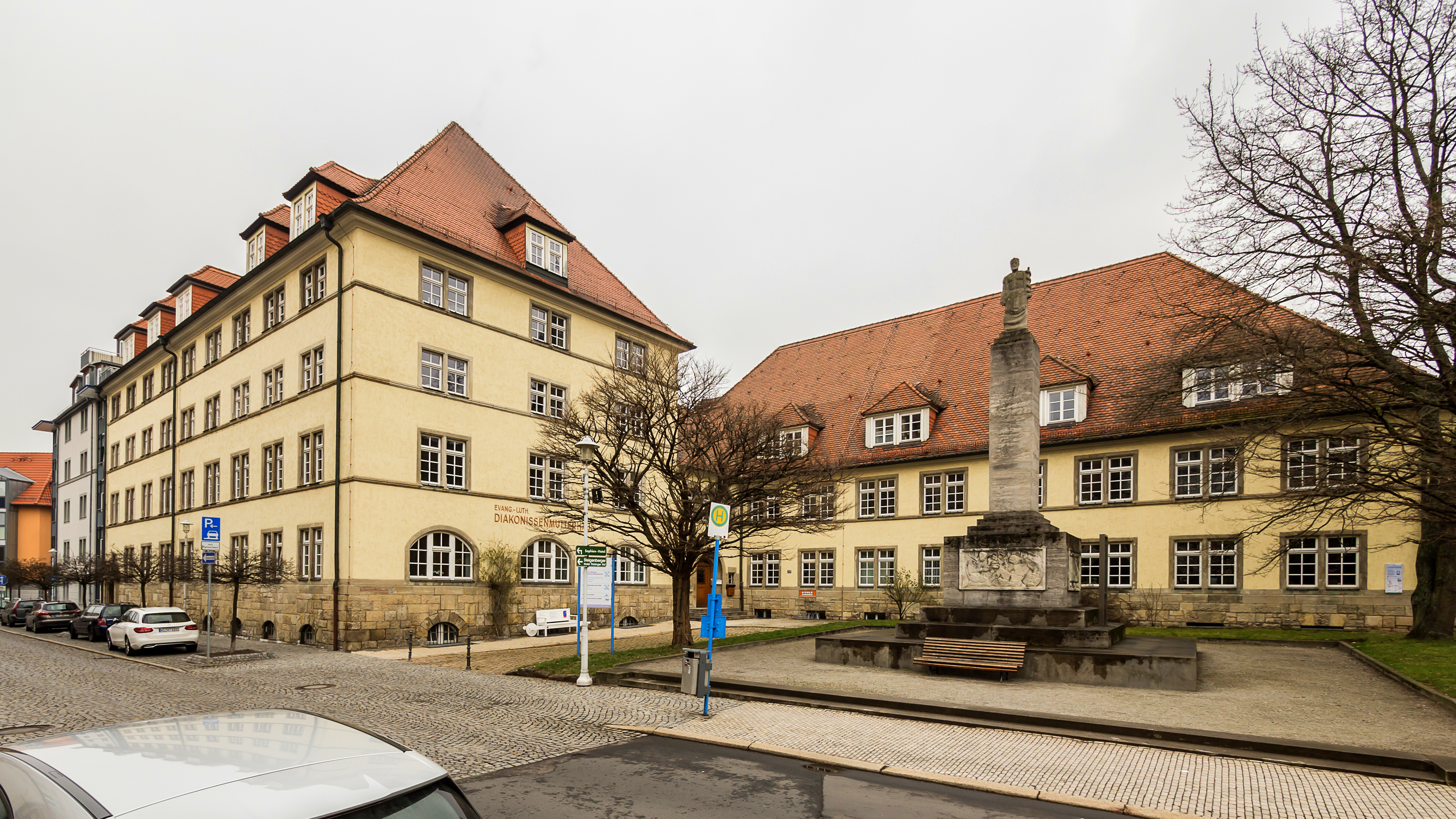 Eisenach Karlsplatz 27-31